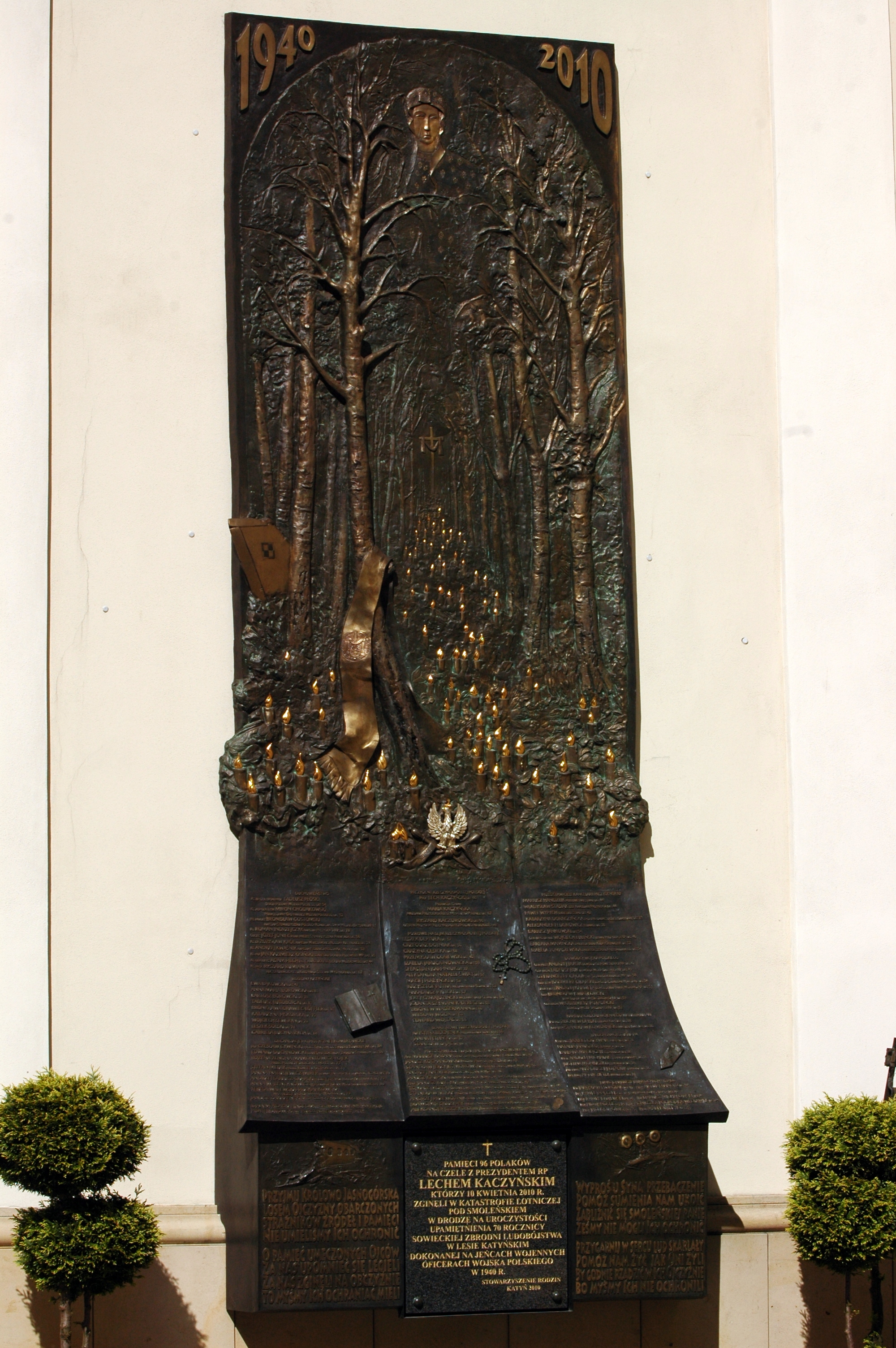 Częstochowa: Jasna Góra